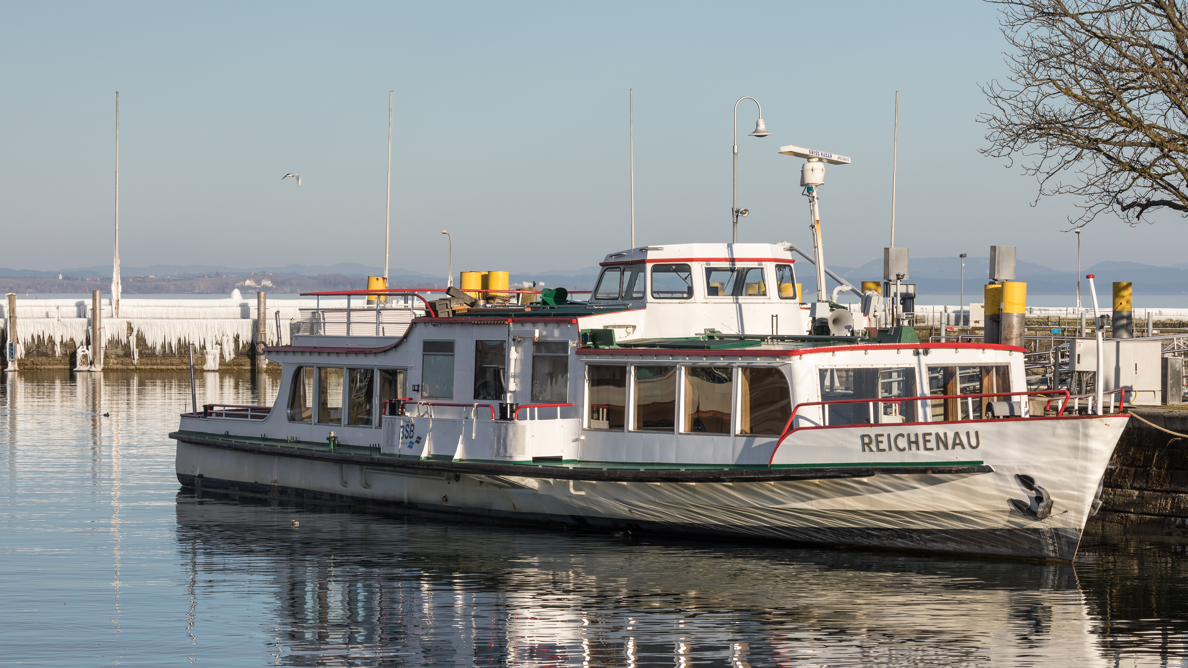 Winterliche Ruhepause in Konstanz für die MS "Reichenau" (März 2018)